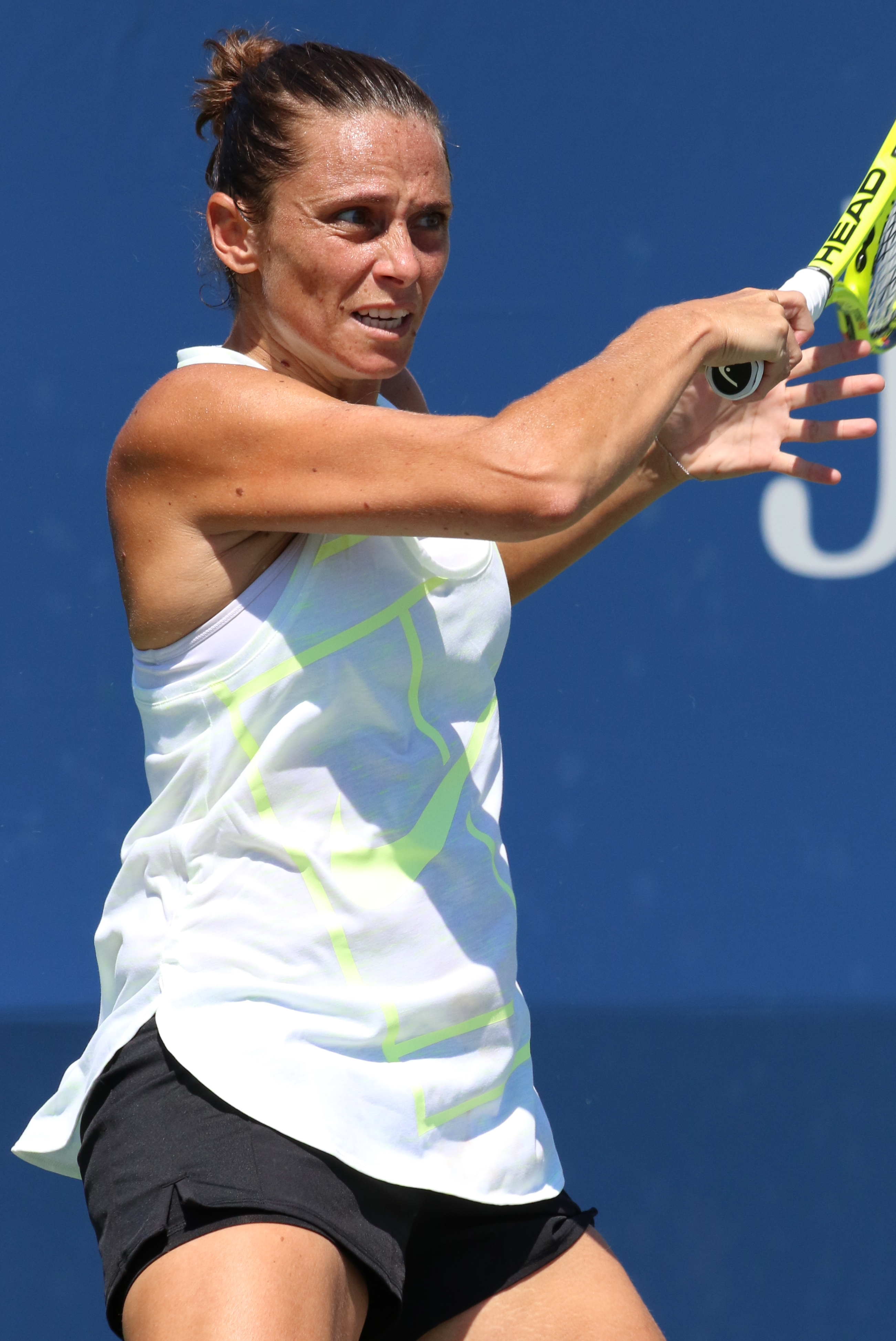 Vinci US16 (22)